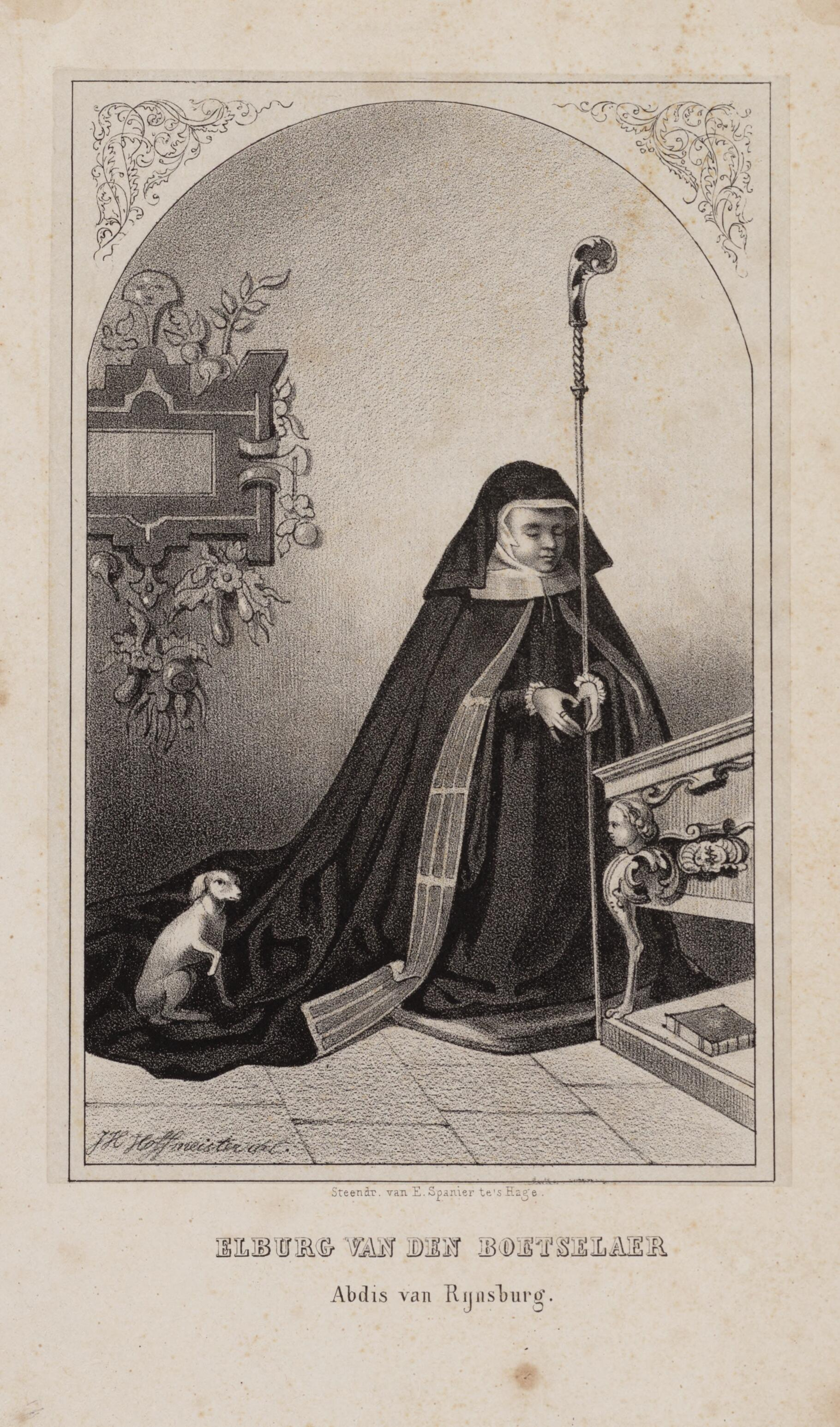 Portret van Elburg van den Boetzelaer (1510-1568), abdis van de abdij Rijnsburg